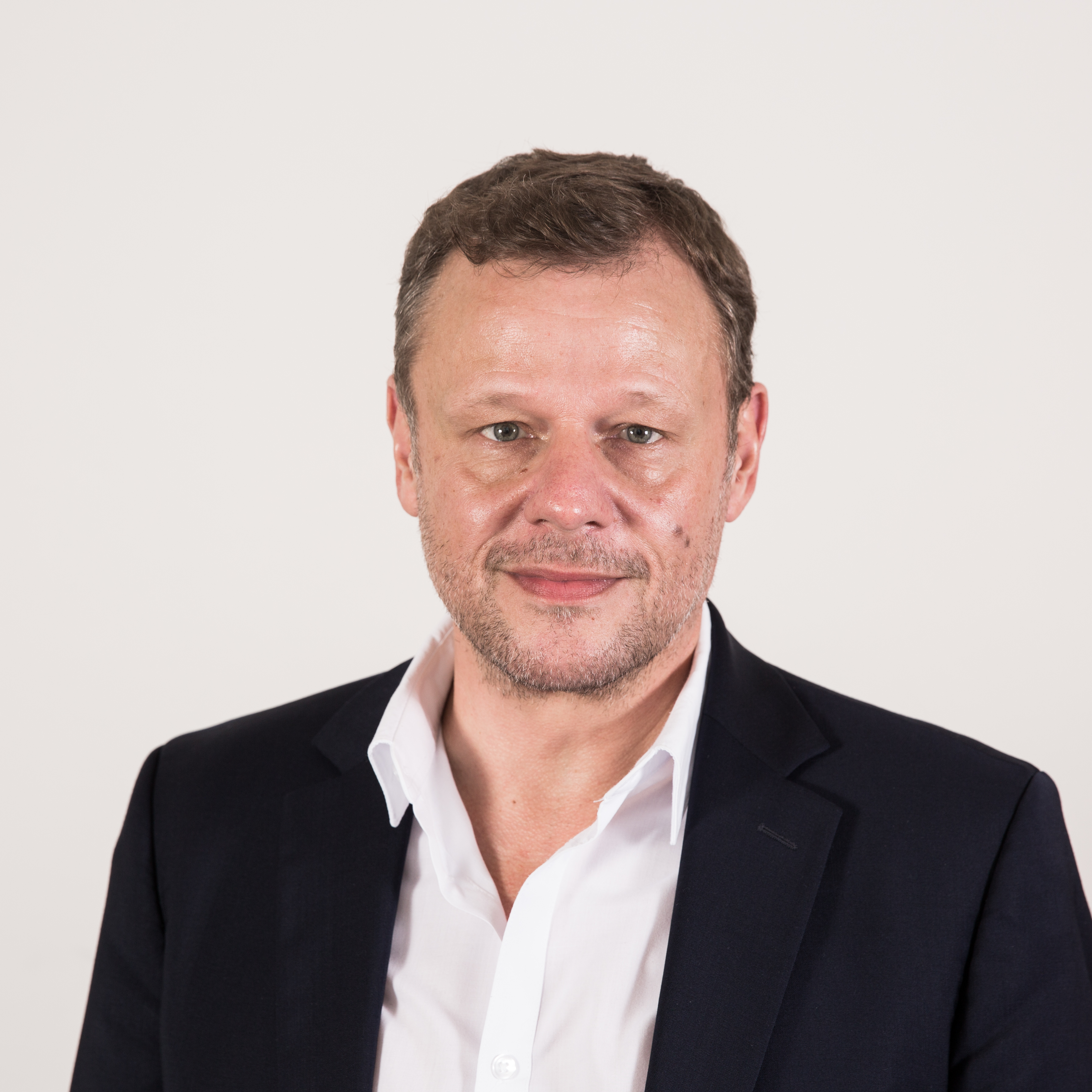 Der saarländische Landtagsabgeordnete Jürgen Renner